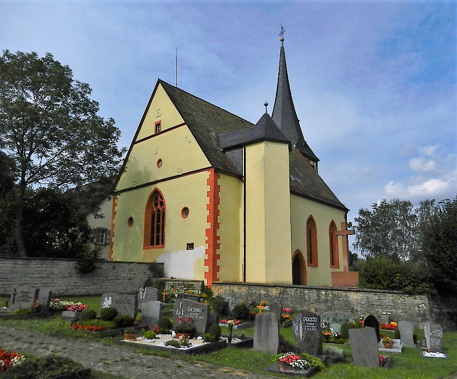 Die evangelische Laurentius-Kirche in Sindolsheim